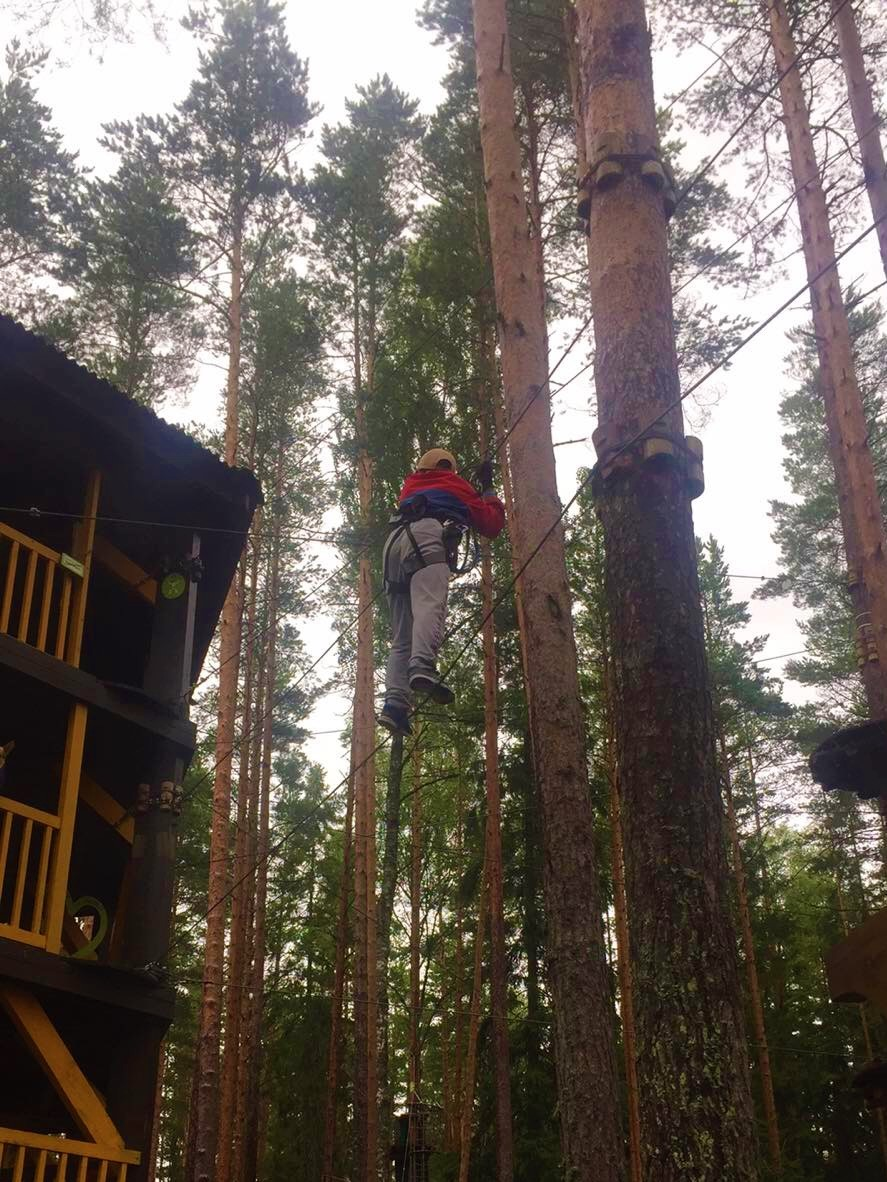 Park visitor on stage